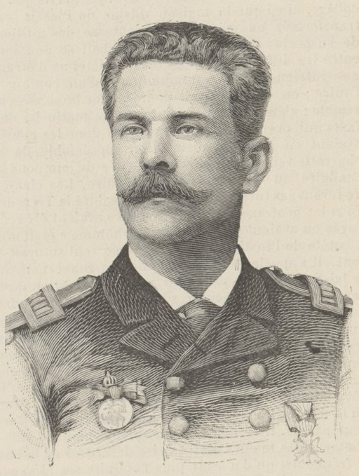 L'amiral de Mello, commandant la flotte devant Rio de Janeiro.